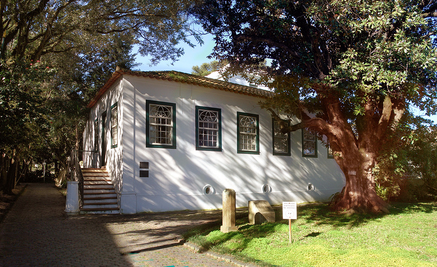 Solar Lopo Gonçalves, hoje Museu de Porto Alegre Joaquim José Felizardo, Porto Alegre, Brasil.